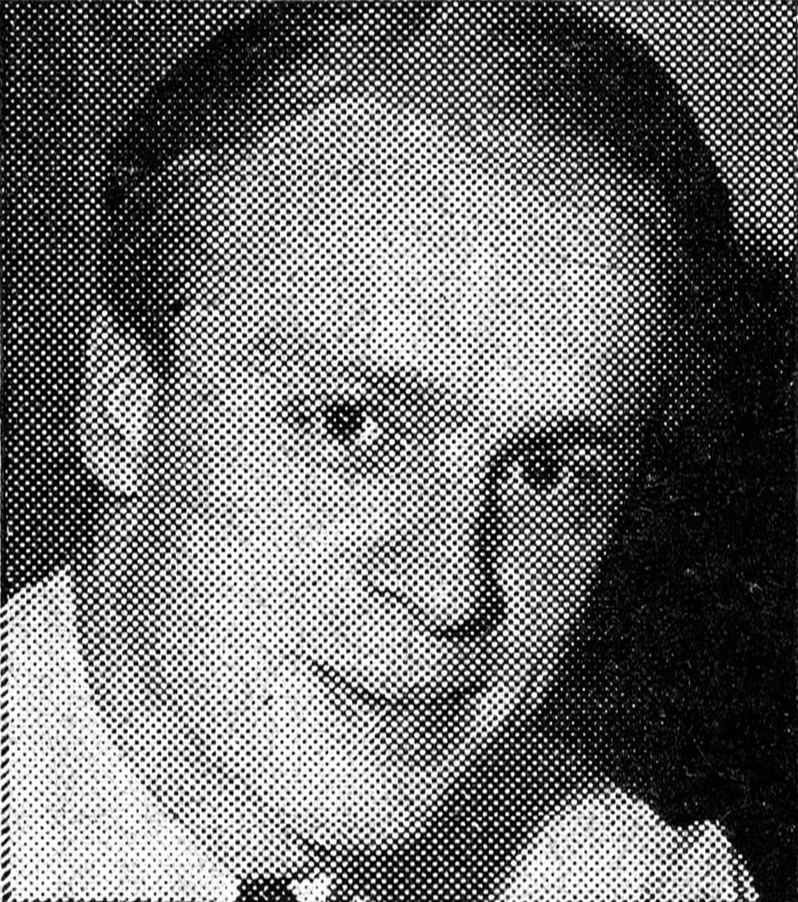 Foto av Sven Anér i När-Var-Hur 1961 (1960).